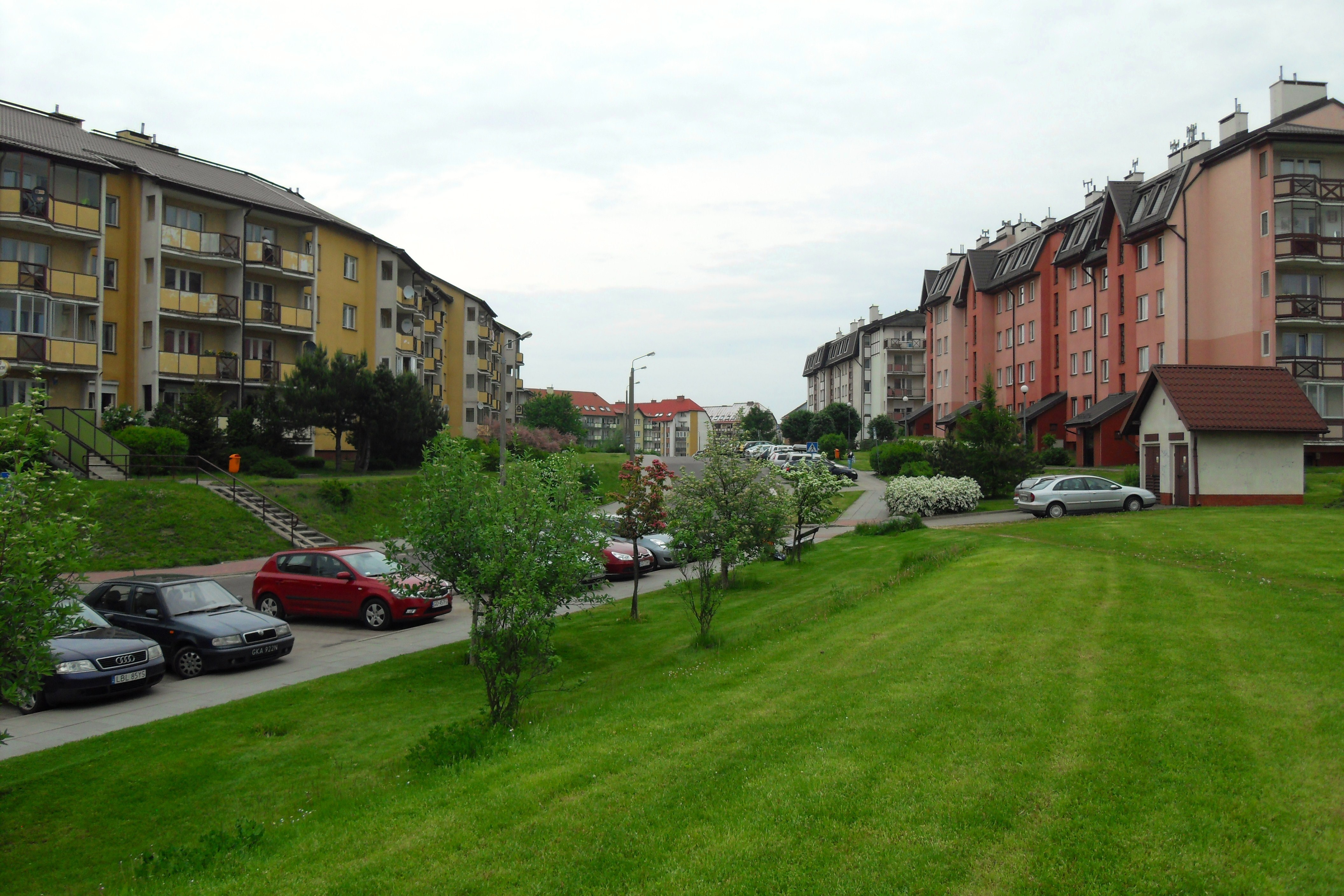 Gdańsk Orunia Górna, ul. Dywizji Wołyńskiej 16, 23 i 27.